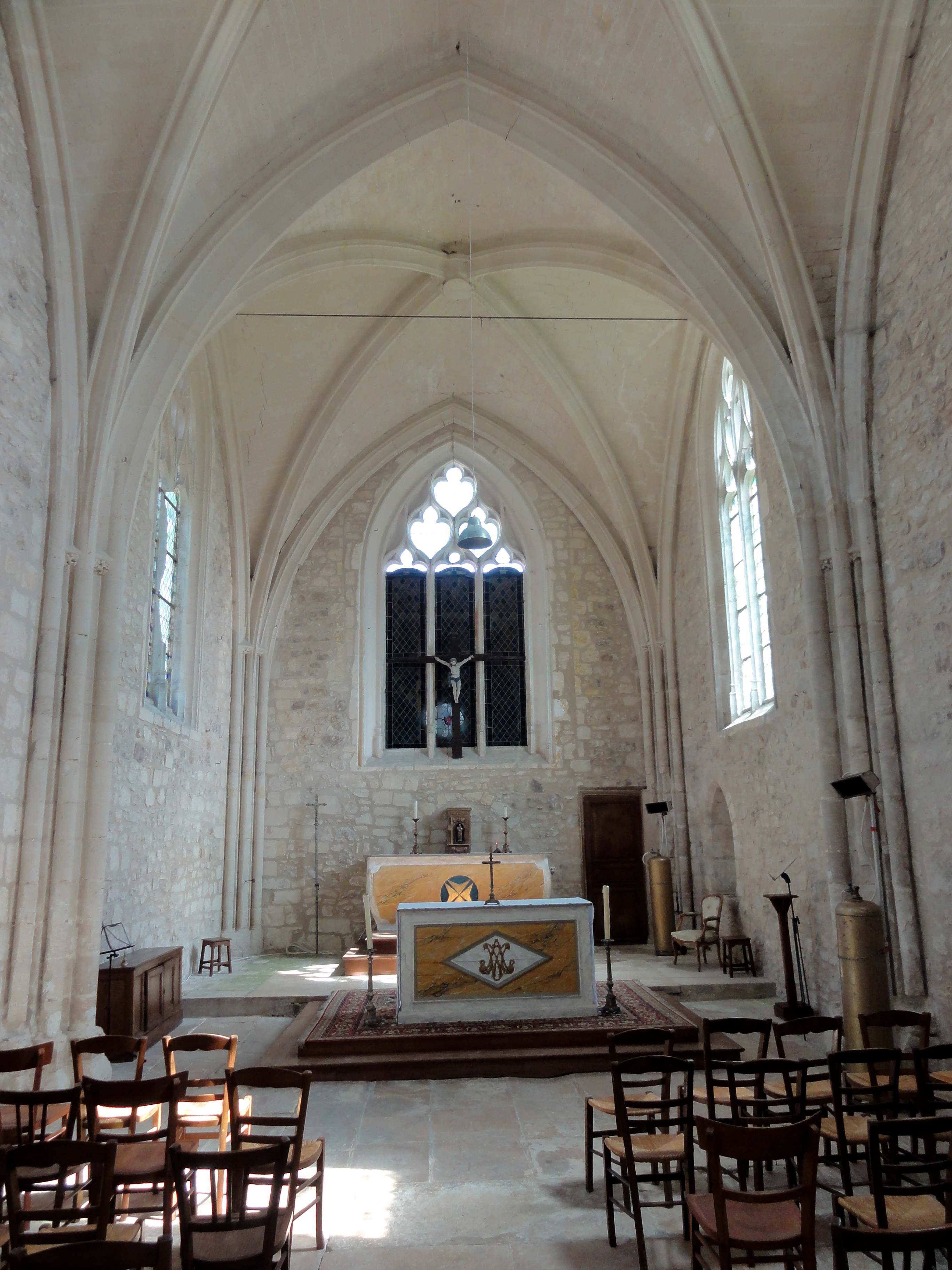 Intérieur de l'église (voir titre).